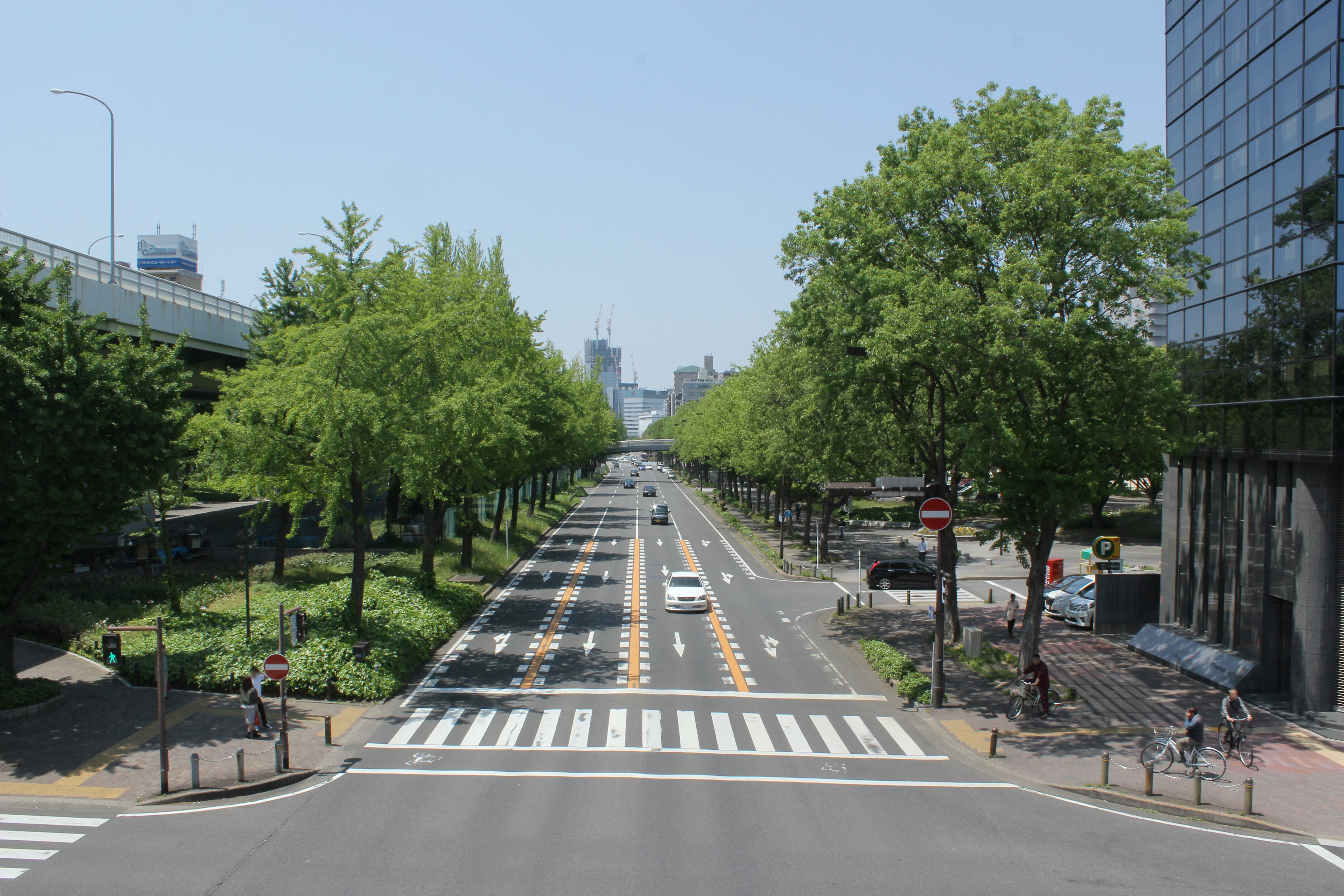 若宮大通（名古屋市中区）